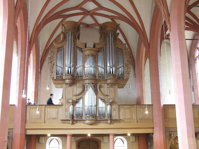 Simultankirche